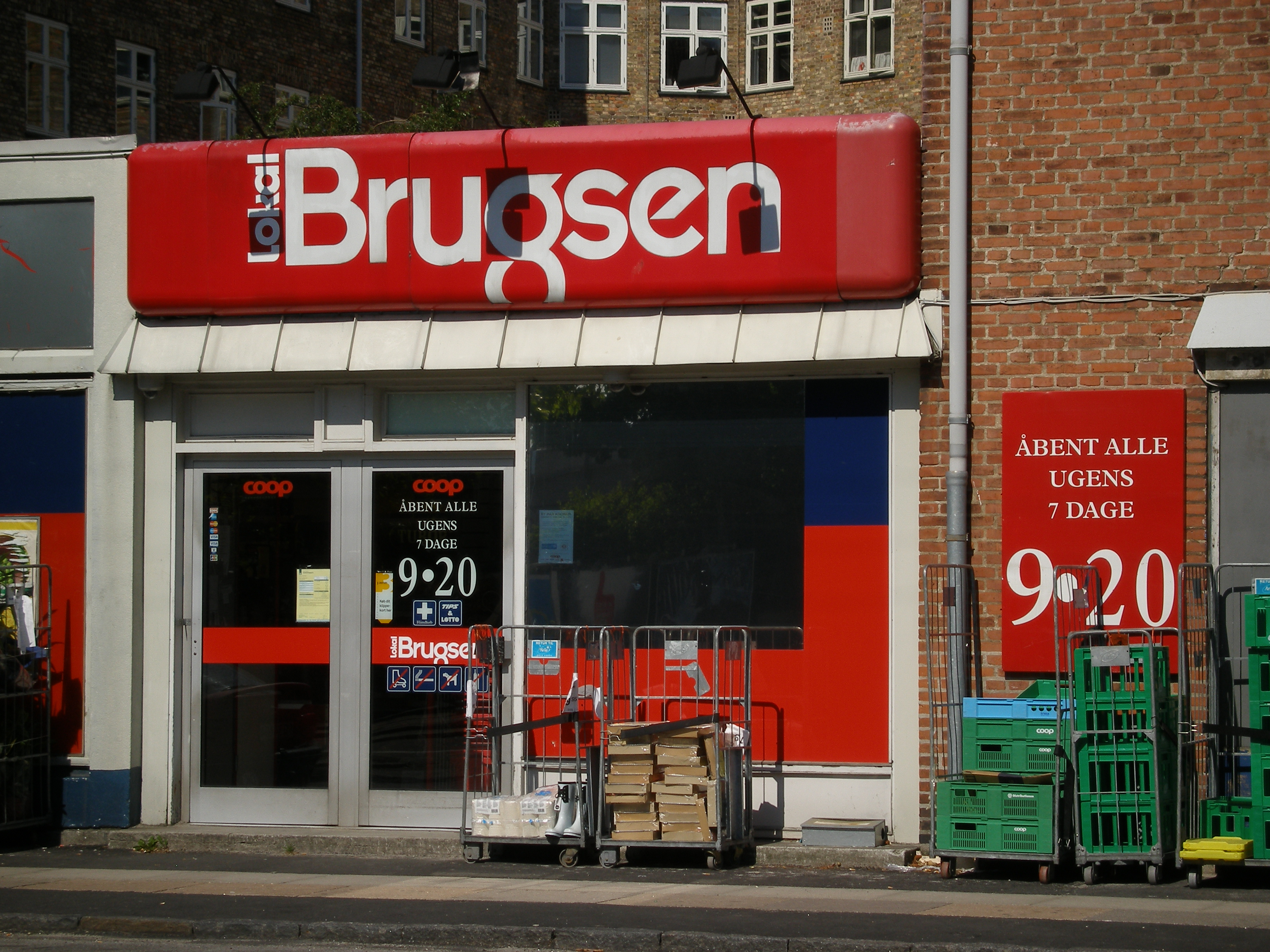 Lokalbrugsen ved Langgade Station, Valby, København